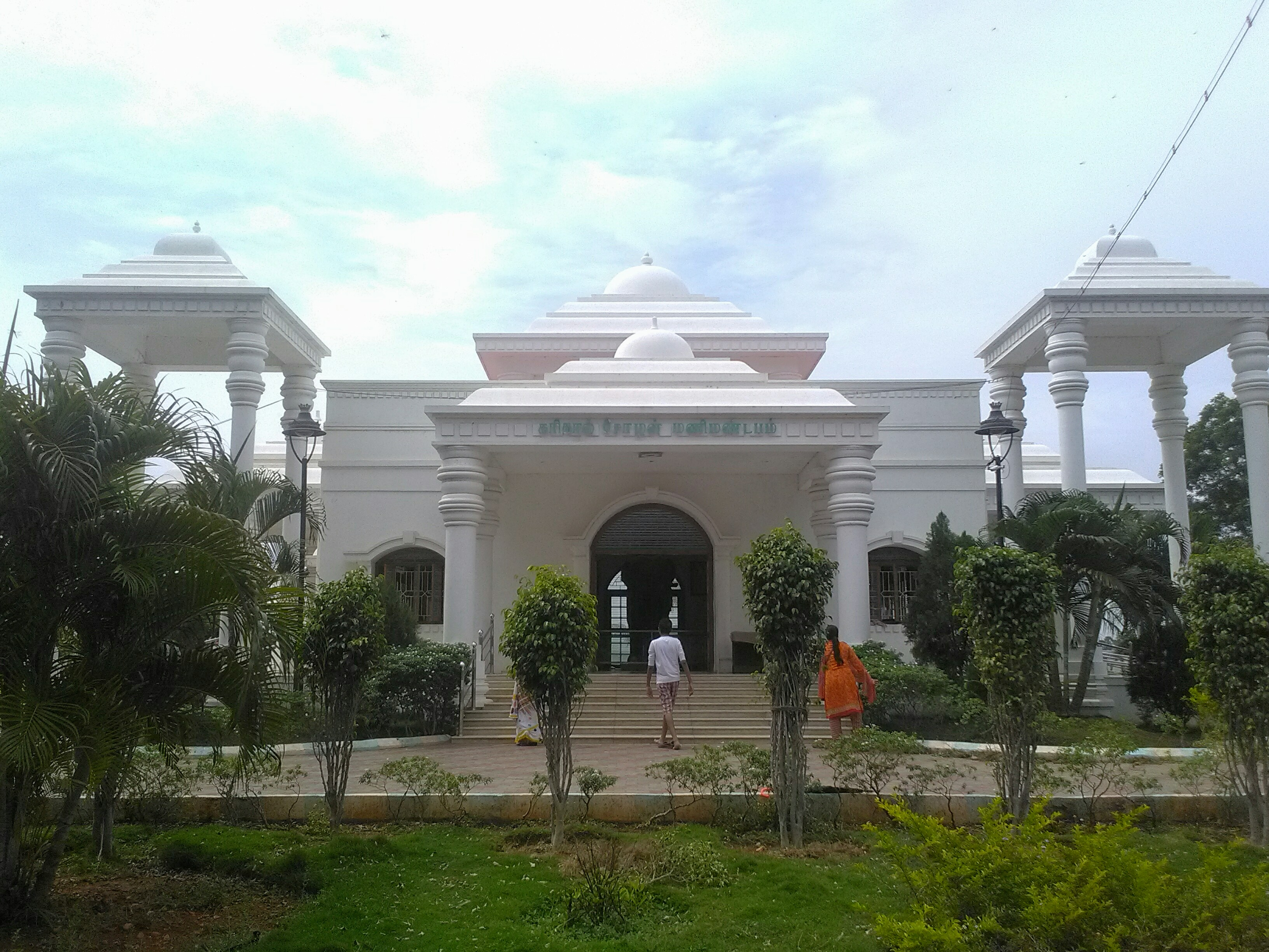 கல்லணையில் கட்டப்பட்டுள்ள கரிகாலச் சோழனின் மணிமண்டபம்.